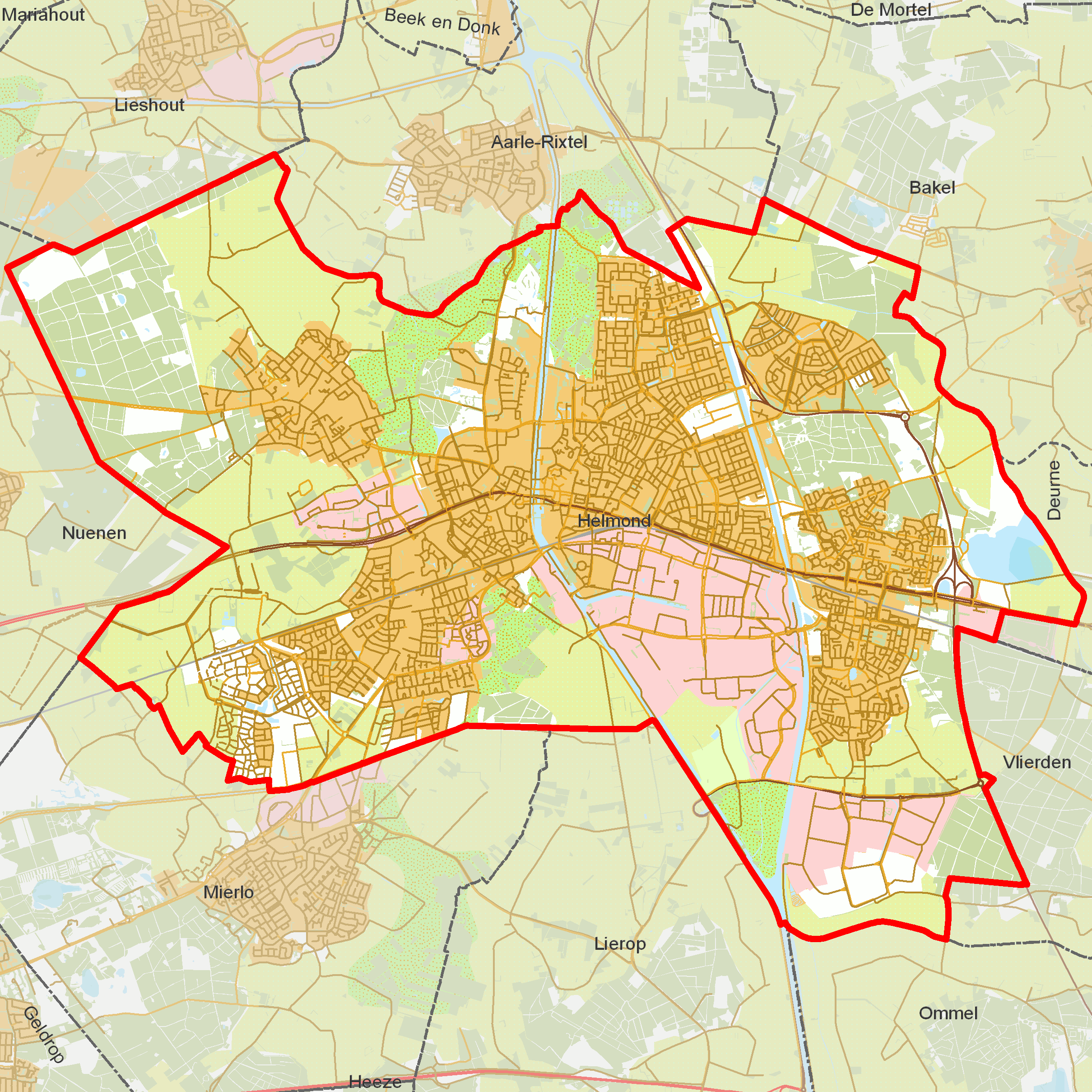 BAG woonplaatsen - Gemeente Helmond.png